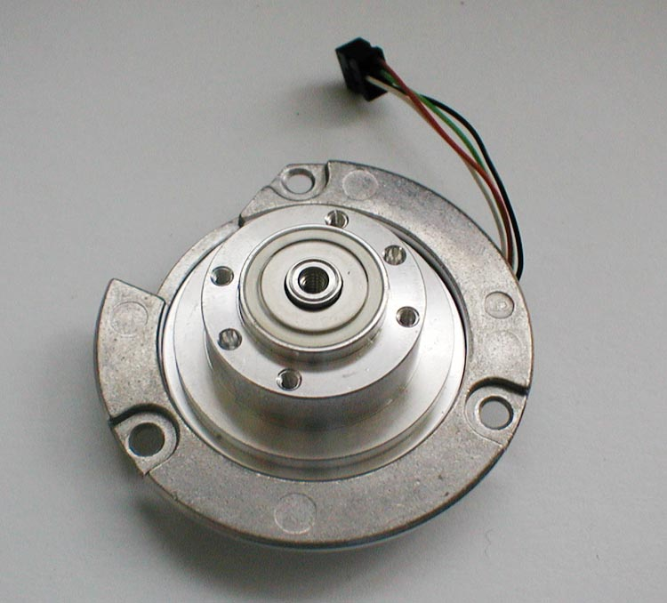 Krokový motor z běžného HDD